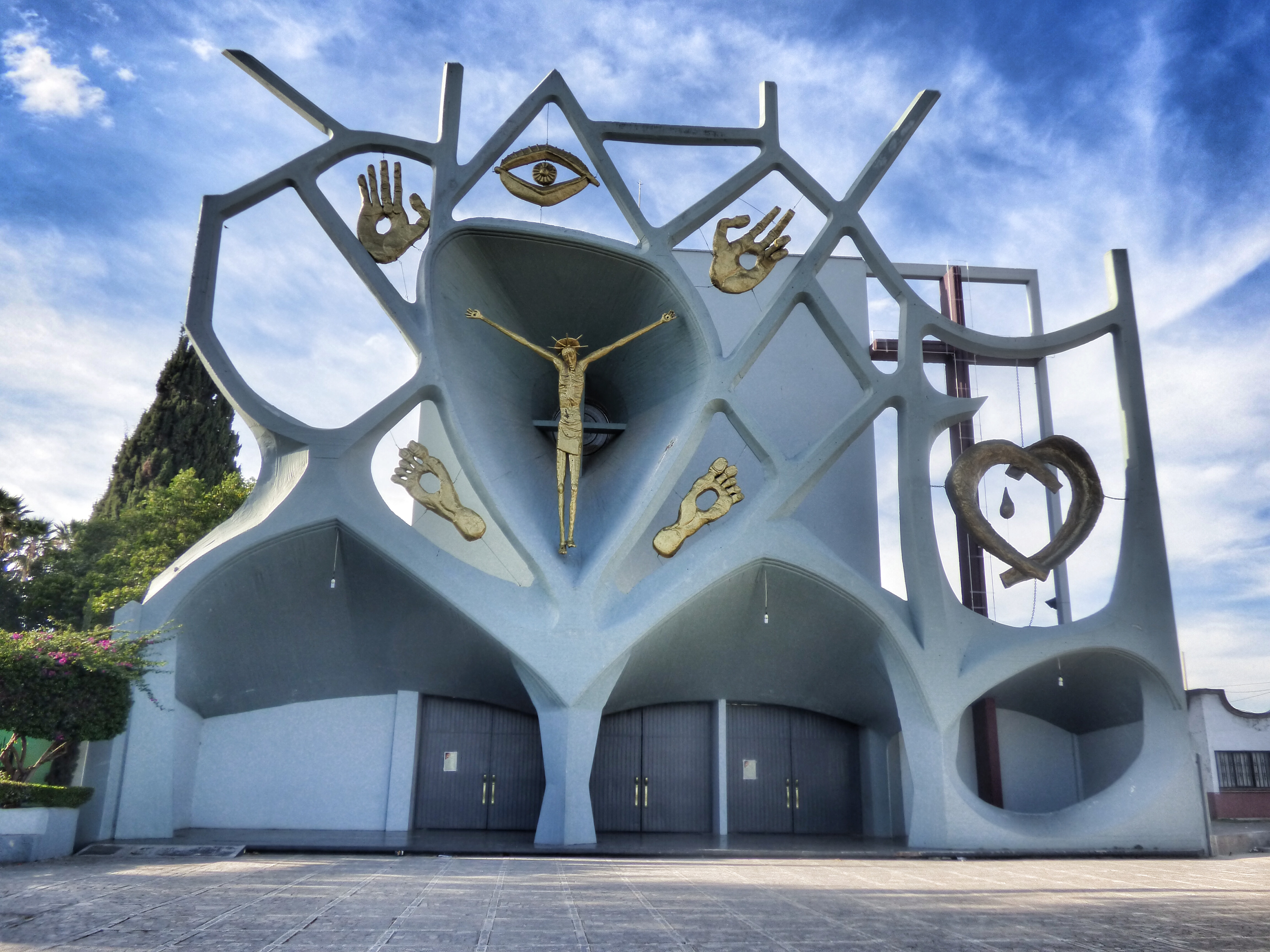 Este templo se encuentra en el Barrio de Guadalupe, a un lado del Panteón de los Ángeles y el Panteón de la Cruz, en la ciudad de Aguascalientes.